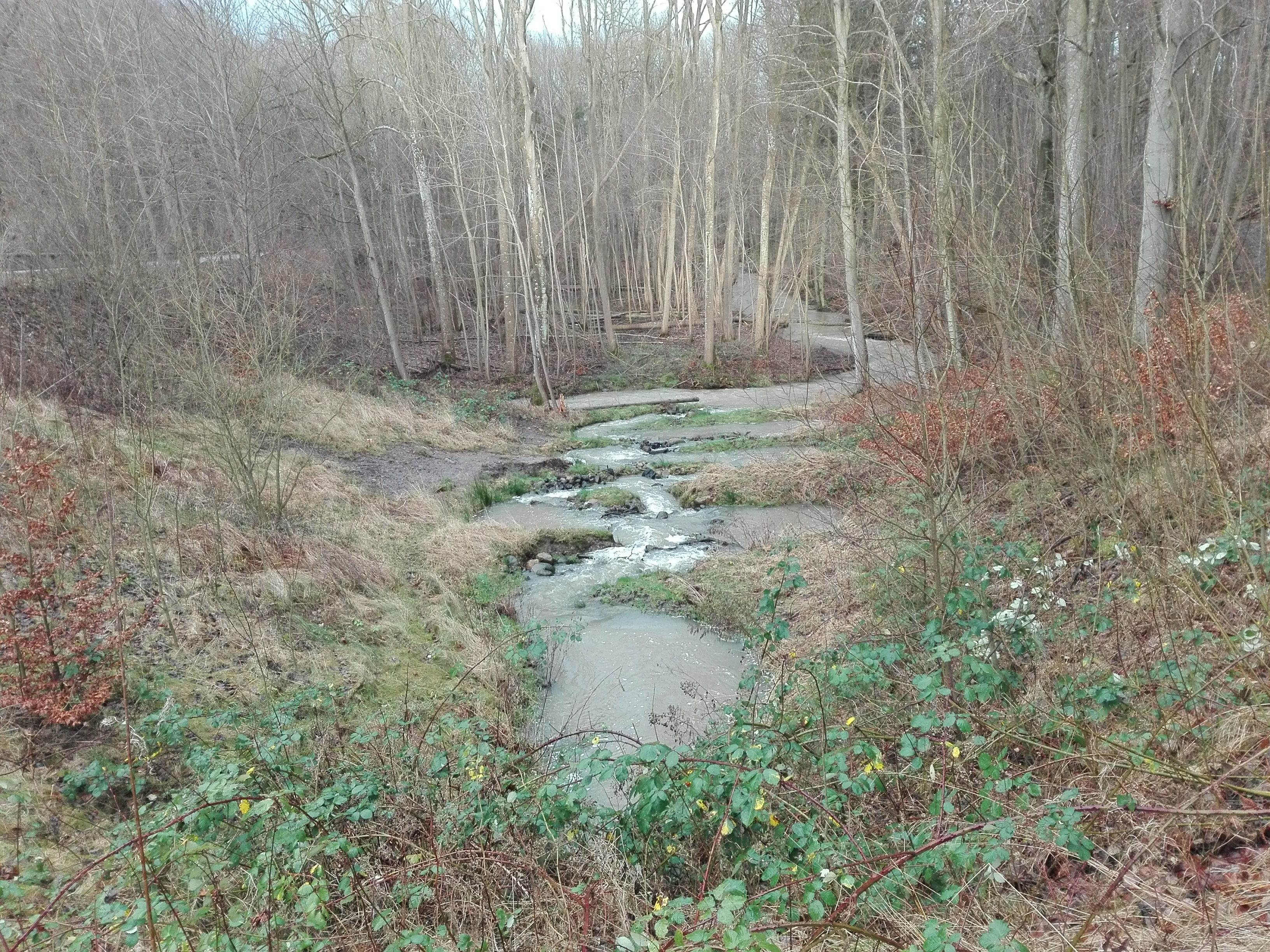 Hovedgrøften Beder